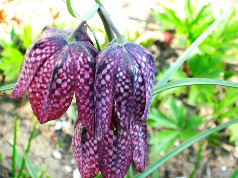 Szachownica kostkowata (Fritillaria meleagris L. ssp. tianshanica Szczurowski) z mojego ogrodu